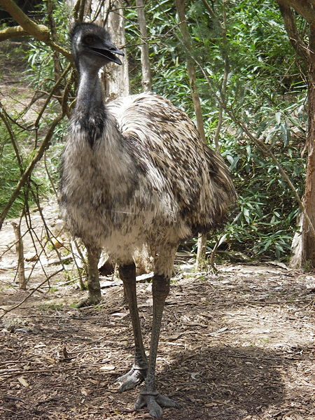 Emeu dans une forêt claire